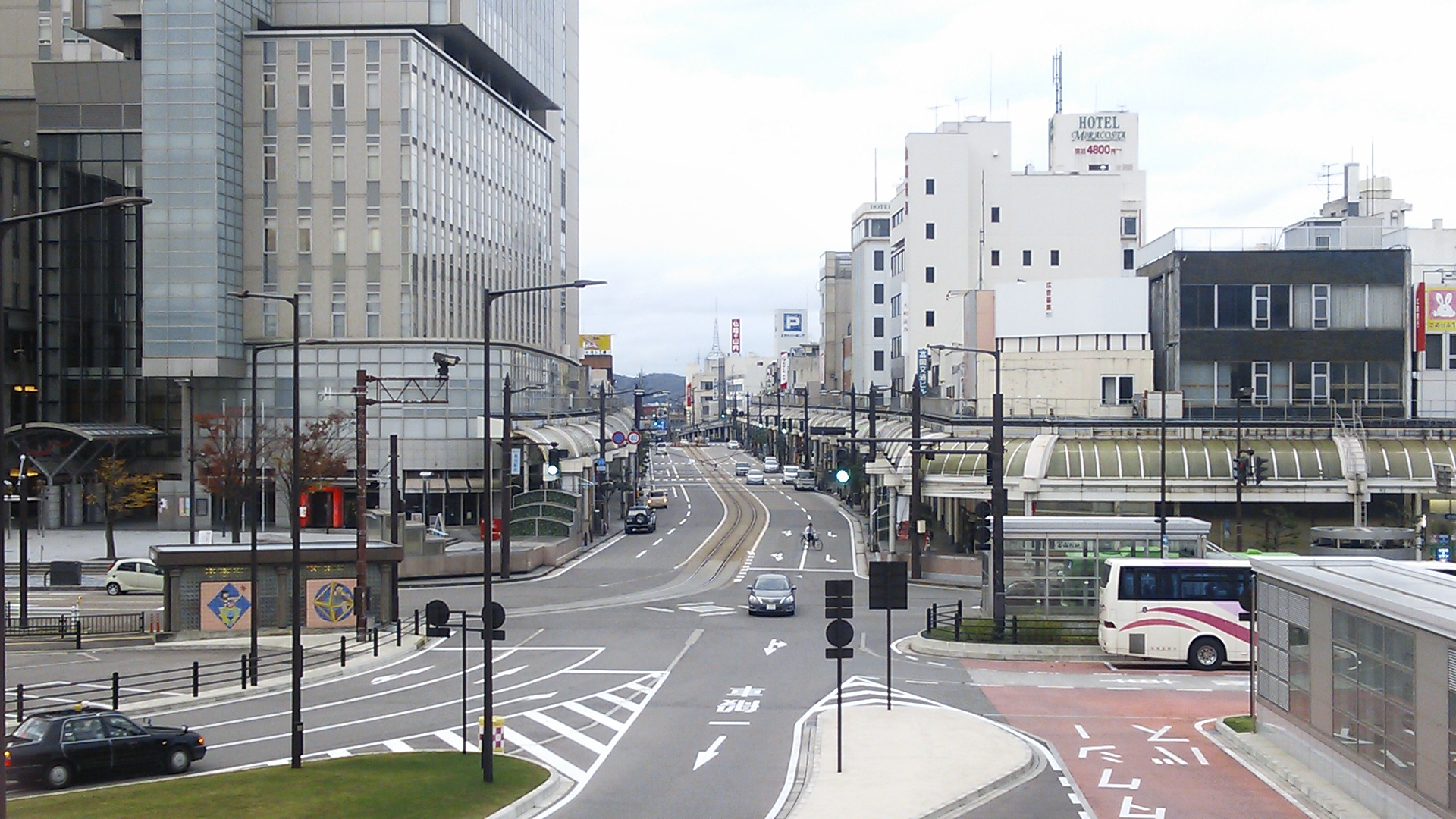 高岡駅前商店街。高岡駅古城公園口二階から望む。間の富山県道23号高岡停車場線にあるのは万葉線高岡軌道線の軌道である。